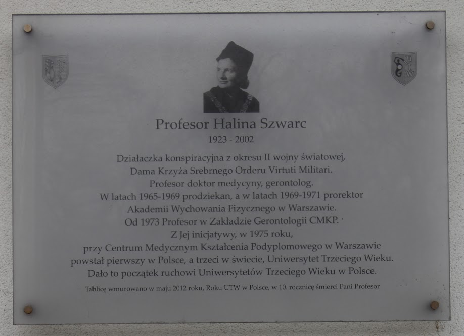 Tablica pamiątkowa prof Haliny Szwarc